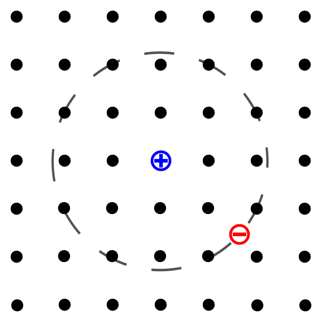 Exziton in einem Kristall, schwarz: Gitterpunkte